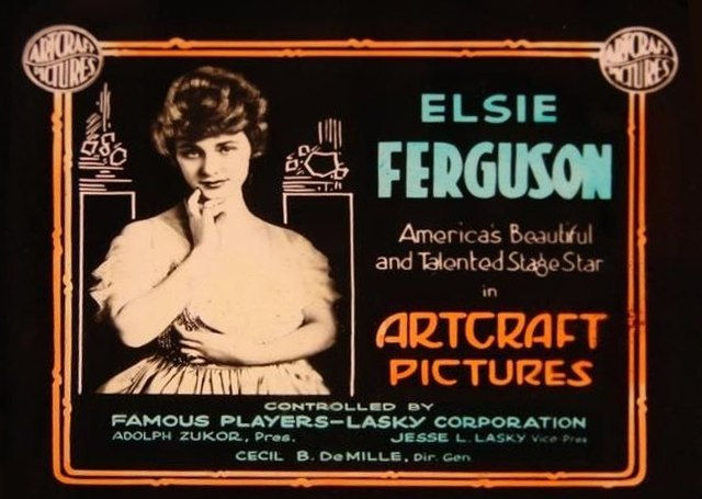 Elsie Ferguson on a lantern slide